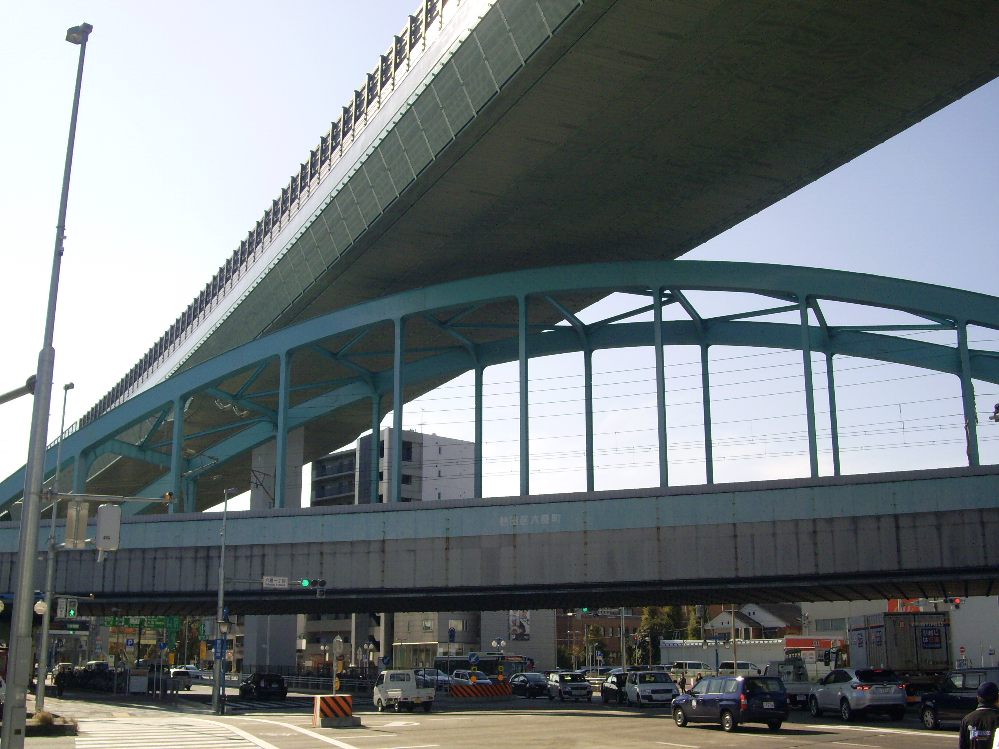 東海道新幹線の第２六番町ローゼ式跨道橋、その上を乗り越えているのは名古屋高速4号東海線 ㊟カメラを起動すると日付機能が出荷時のものに初期化されるため、ファイル履歴の撮影日時とメタデータの原画像データの生成日時が異なります